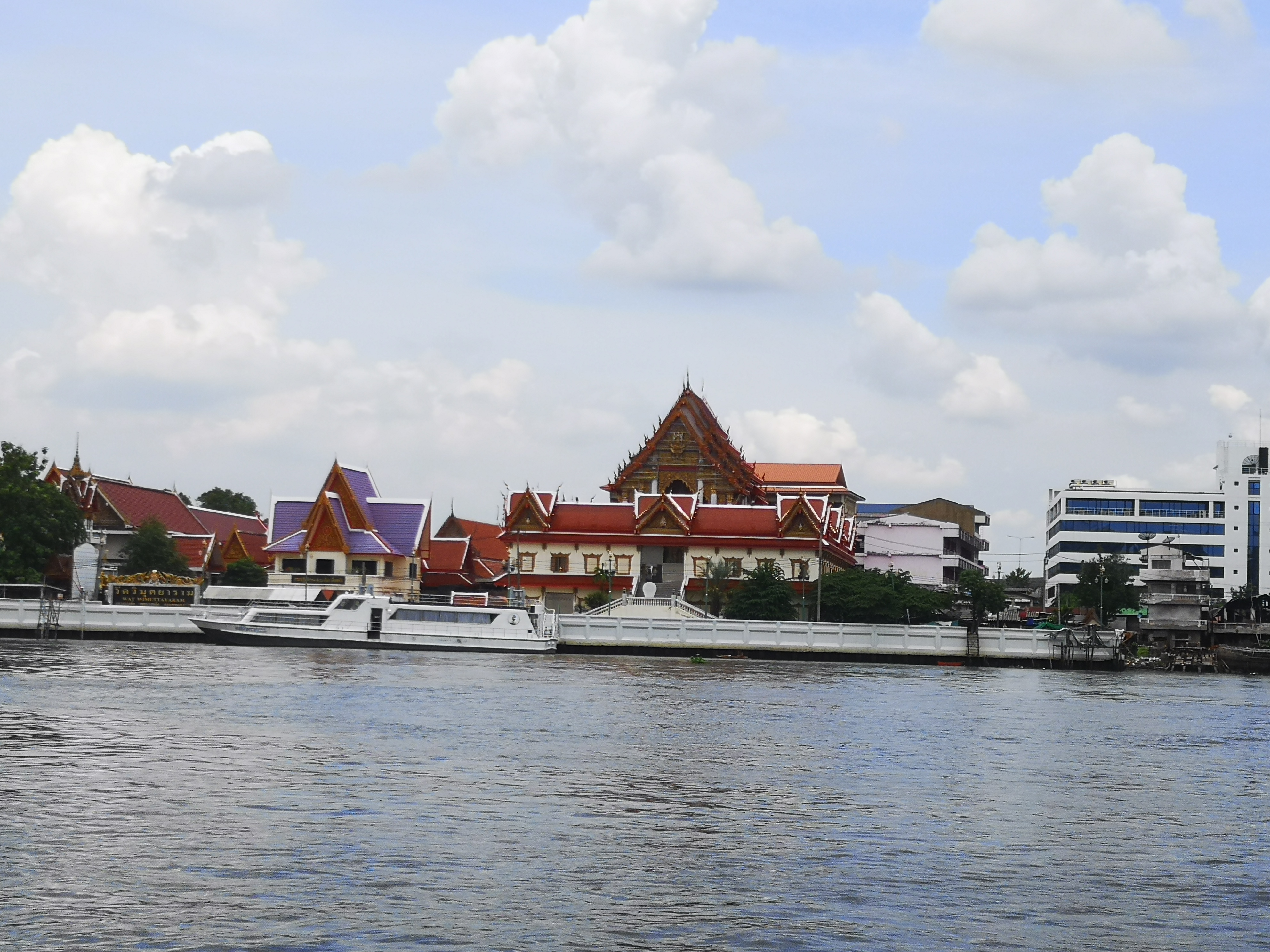 วัดวิมุตยาราม